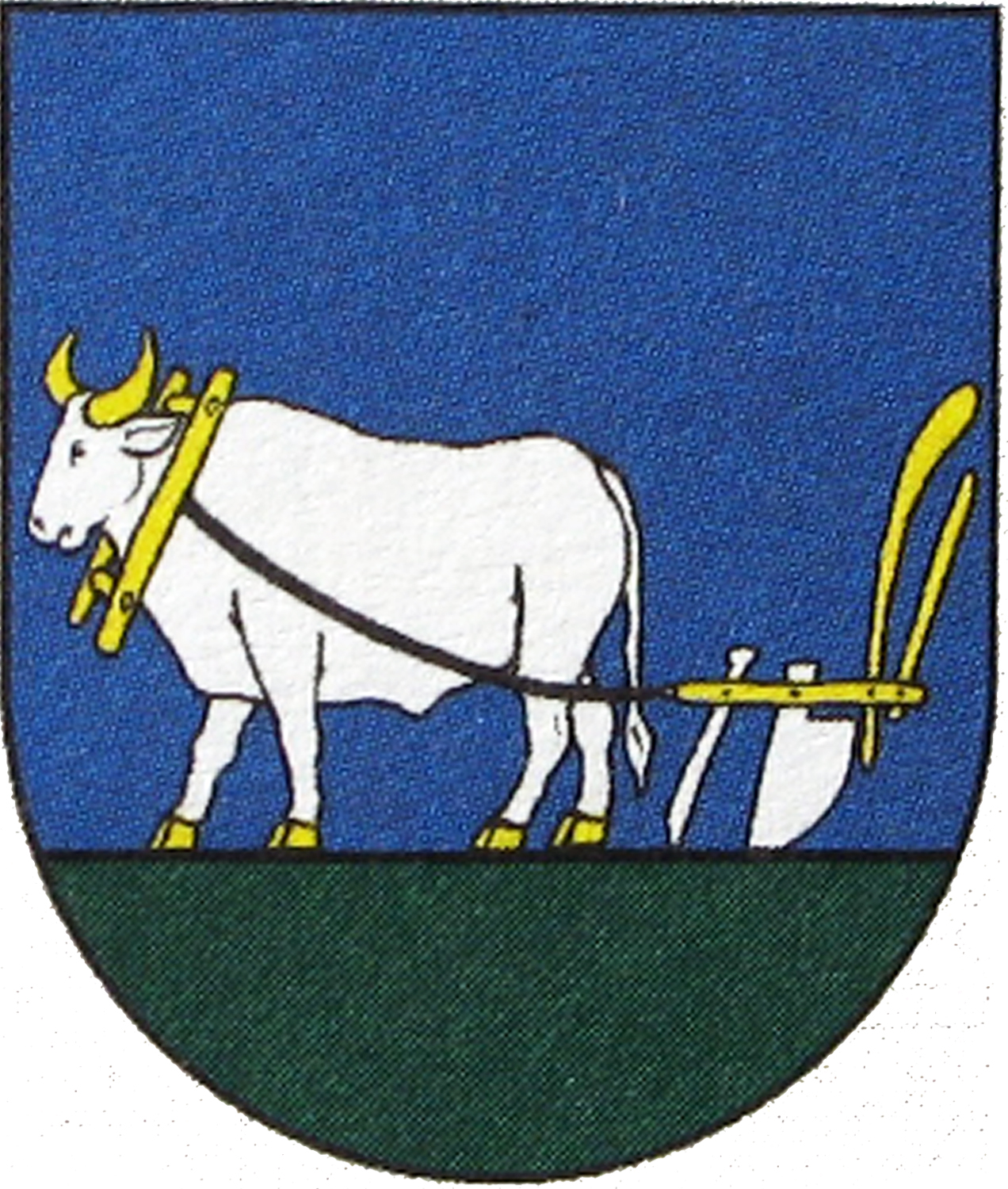 Erb obce Kapišová (HR: K-79/1996): V modrom štíte na zelenej rovnej pažiti je strieborný vôl v zlatej zbroji a v zlatom postroji, ťahajúci zlatý pluh so striebornými radlami.